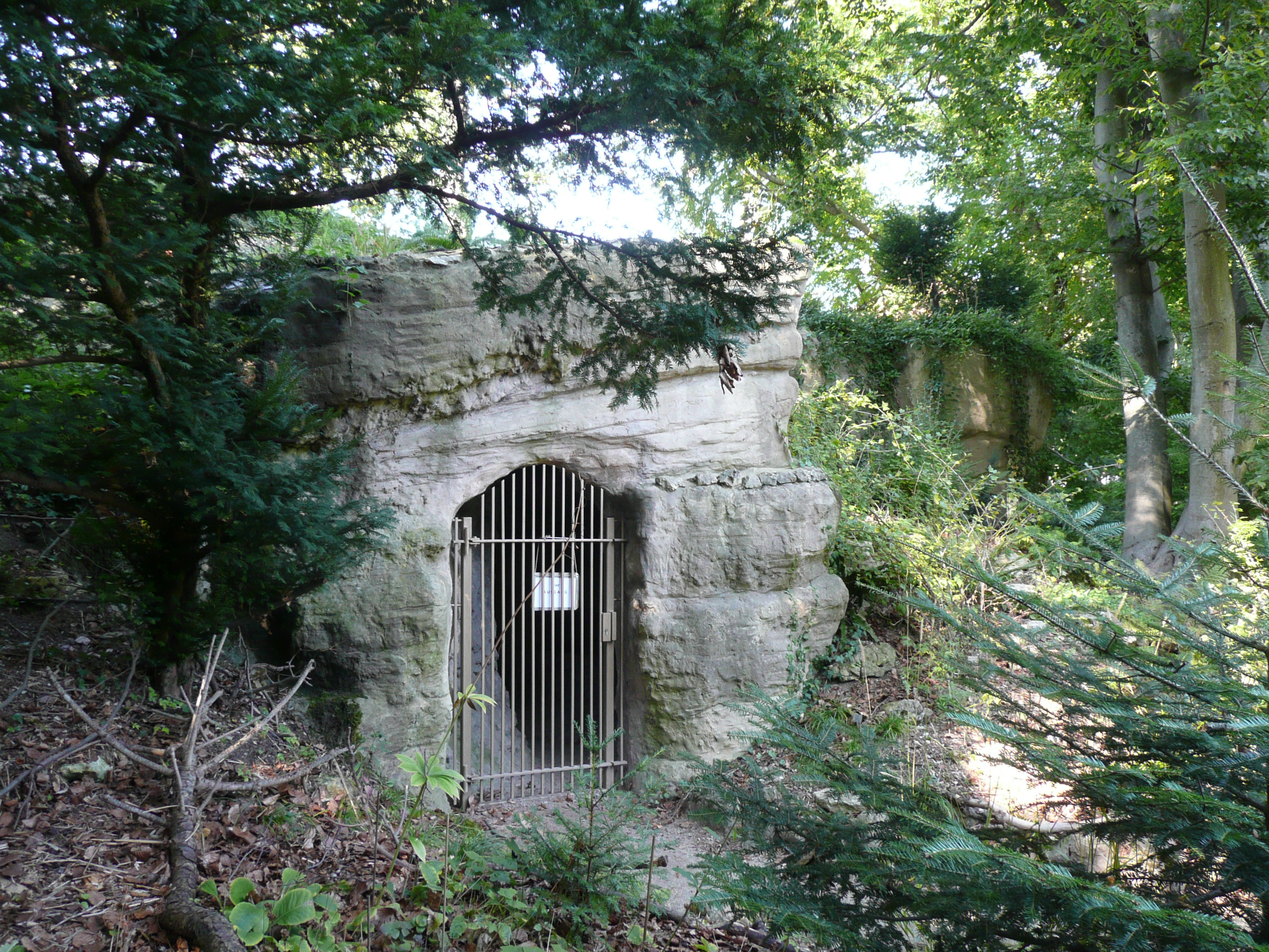 Einer der beiden Eingänge der Neischl-Jura-Höhle; Nachbau einer Jura-Grotte für die Bayerische Jubiläums-Landesausstellung 1906, 1907 im Botanischen Garten Erlangen wieder aufgebaut; Sanierung erhielt 2008 den Bayerischen Denkmalpreis in Bronze; D-5-62-000-597